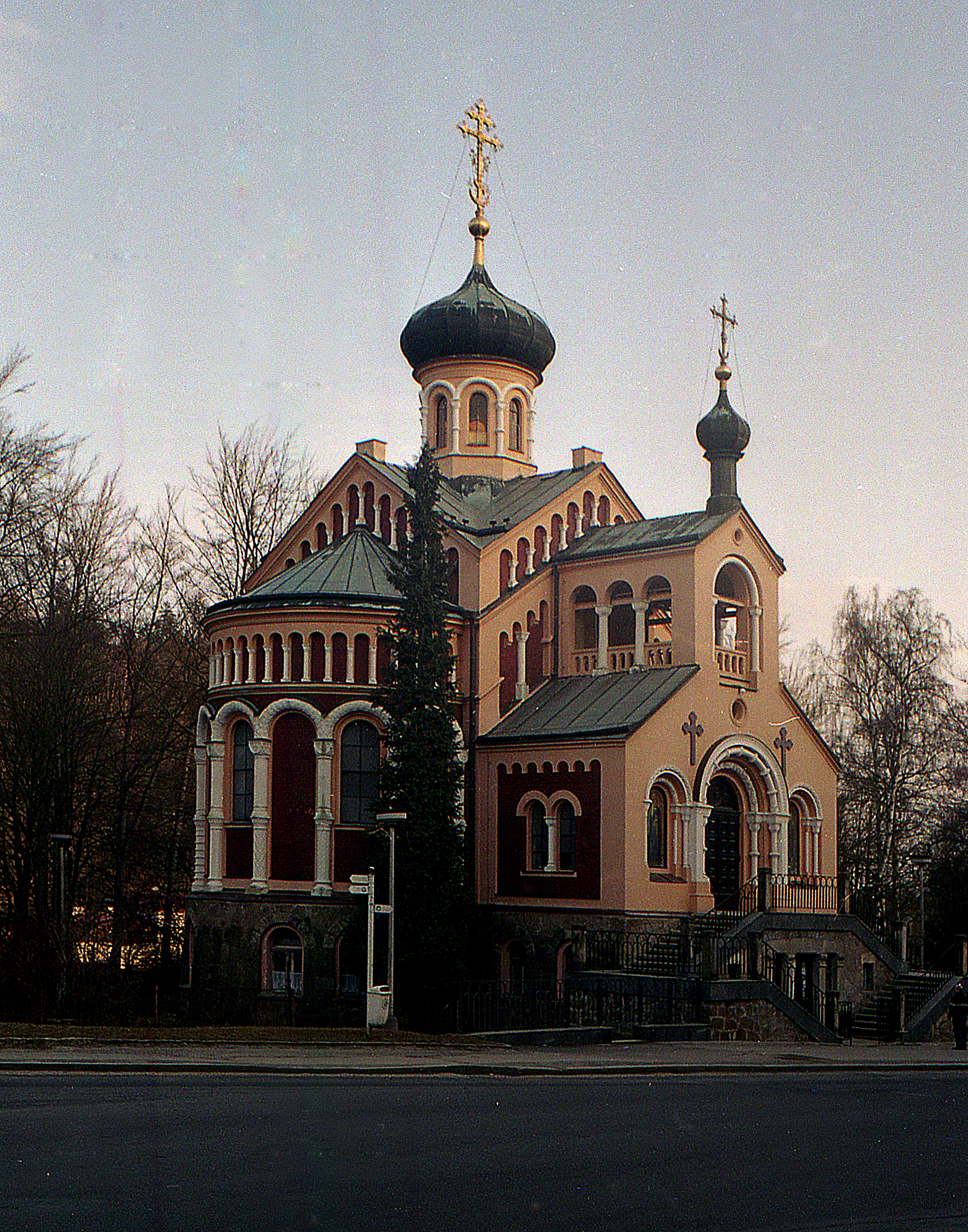 Мариенбад.Русская православная церковь.